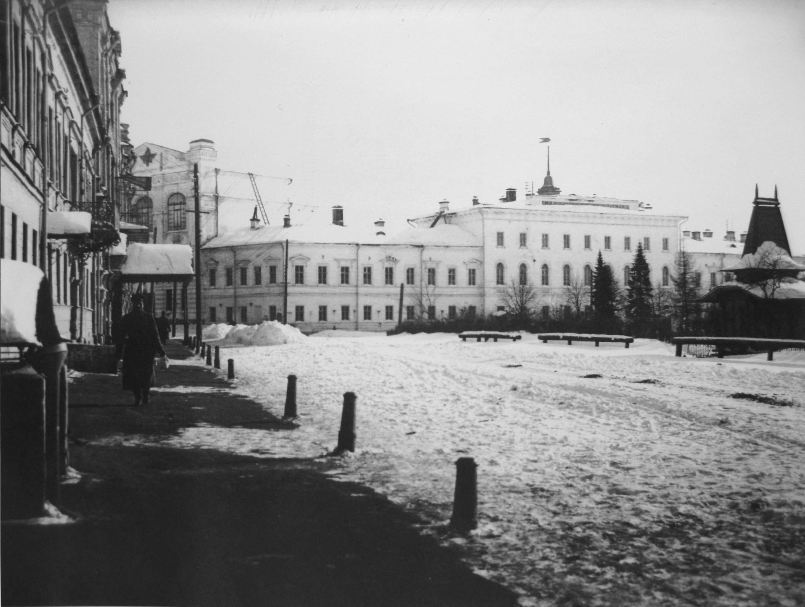 Благовещенская площадь. Губернская гимназия. Ныне Педагогический университет на пл Минина и Пожарского в Нижнем Новгороде